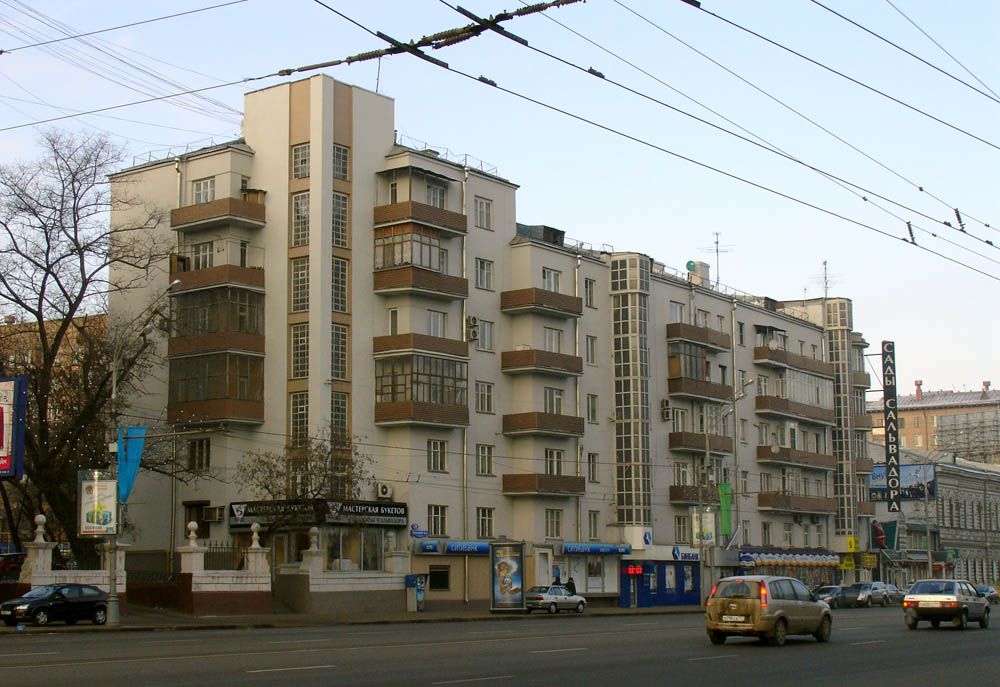 Zemlyanoy Val (Garden Ring), Moscow Москва. Земляной Вал, 34